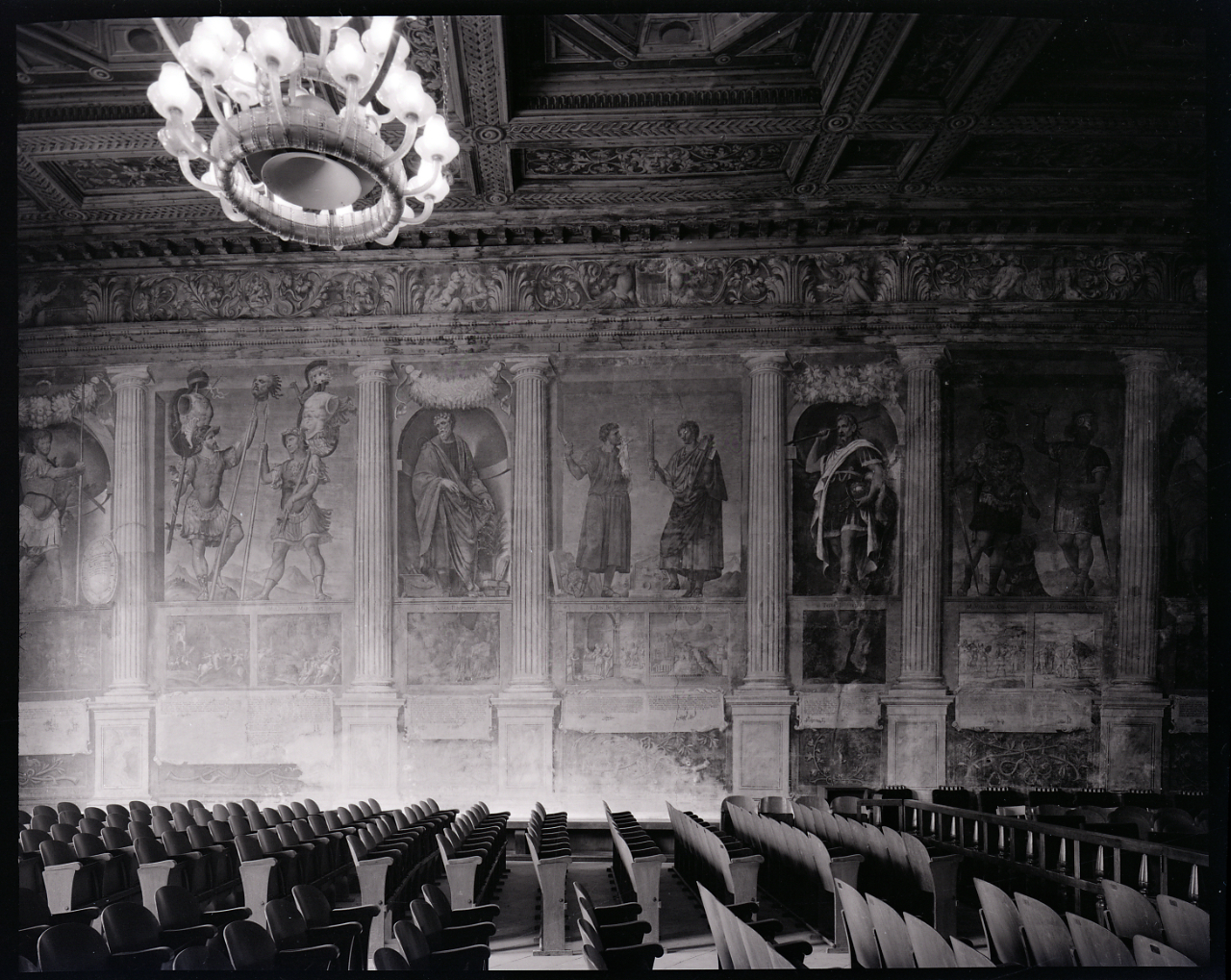 Servizio fotografico : Padova, 1967 / Paolo Monti. - Buste: 16, Fototipi: 18 : Negativo b/n, gelatina bromuro d'argento/ pellicola ; 10x12. - ((Serie costituita da 16 buste sciolte di negativi identificati con i nn.: 13530, 13531, 13532, 13533, 13534, 13535, 13536, 13537, 13537bis, 13538, 13539, 13540, 13541, 13542, 13543, 13544. - Occasione: Documentazione per la pubblicazione: Diego Valeri (a cura di), "Padova: i secoli, le ore", Bologna, Edizioni Alfa, 1967. - Fonte: Monografia di Valeri Diego (a cura di): Padova: i secoli, le ore, Bologna, Edizioni Alfa (1967). - Fonte: Agenda di Paolo Monti: Monti/ 3 aprile 1966 - 9 marzo 1971/ 12421-16823 (1966-1971), presso Archivio Paolo Monti